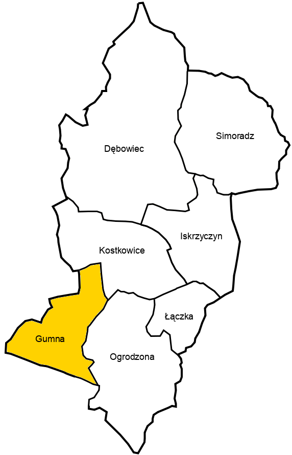 Sołectwo Gumna na mapie gminy